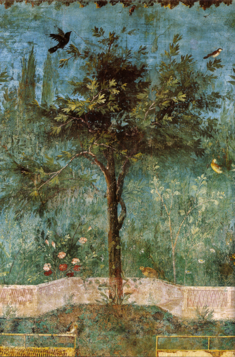 Villa di livia, affreschi di giardino, parete corta meridionale, pianta con uccelli